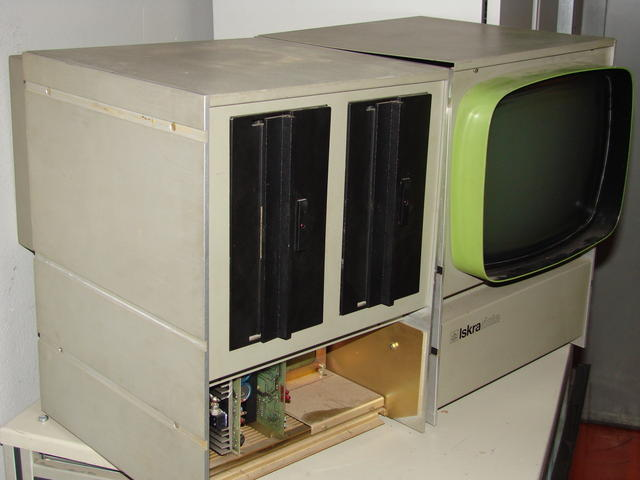 IskraData 100.